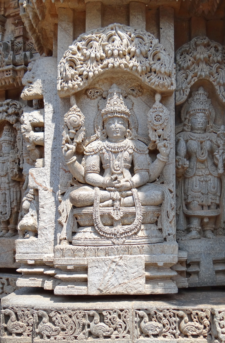 Vishnou sur les murs extérieurs du temple de Chennakesava (ou Chennakeshava) à Somnathpur (ou Somanathapura) L'édification de ce temple de style Hoysala date de 1269. C'est Somanatha, un des généraux du roi hoysala Narashimha III (1254-1291) qui en est le commanditaire initial. C'est l'un des plus beaux temples indiens de la période médiévale. L'état de conservation de la structure et des décors est remarquable. Ce temple est composé de trois sanctuaires dédiés à Vishnou (Kesava, Venugopala, Janardhana), surmontés chacun d'un sikhara et reliés entre eux. Il est construit sur une plateforme en étoile et entouré d'une enceinte à galerie comprenant 64 chapelles secondaires. Les murs extérieurs et intérieurs ainsi que les colonnes sont très richement décorés de reliefs sculptés. Les sculpteurs ont pour la plupart signé leurs oeuvres. Sites de référence